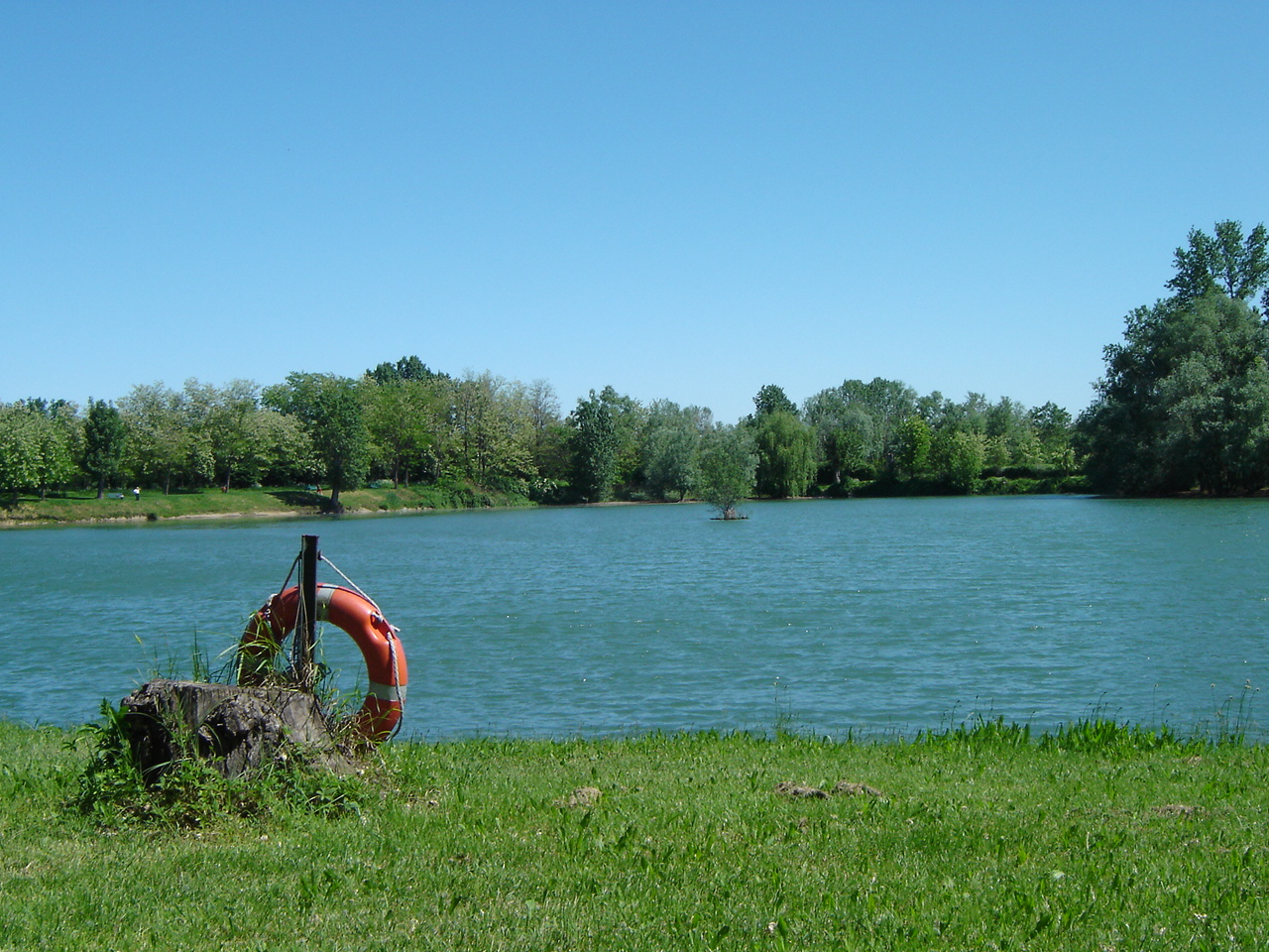 Cava Aurora. Autore: Riccardo De Benedictis